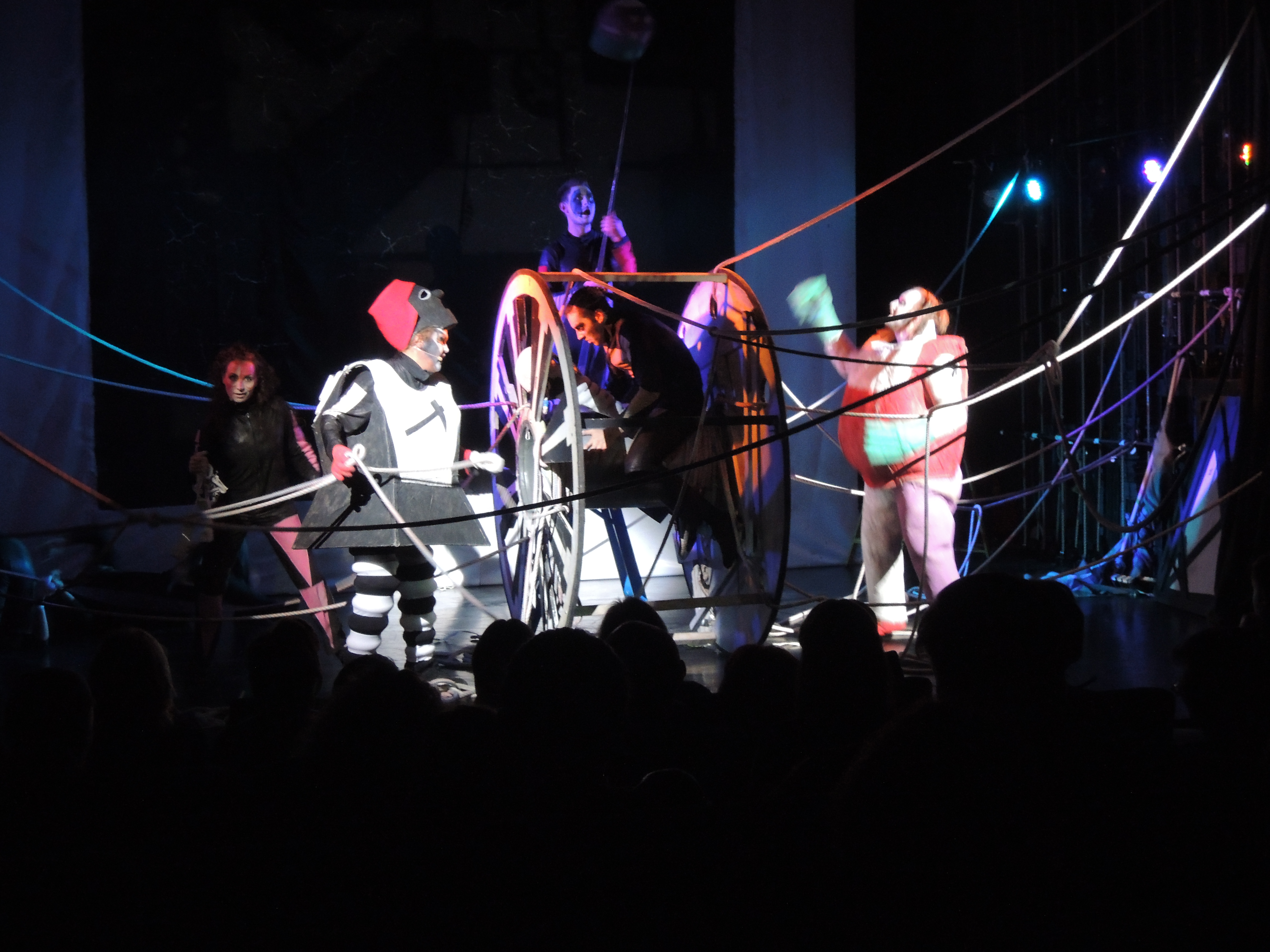 Победа над Солнцем, театр Стаса Намина, 2014